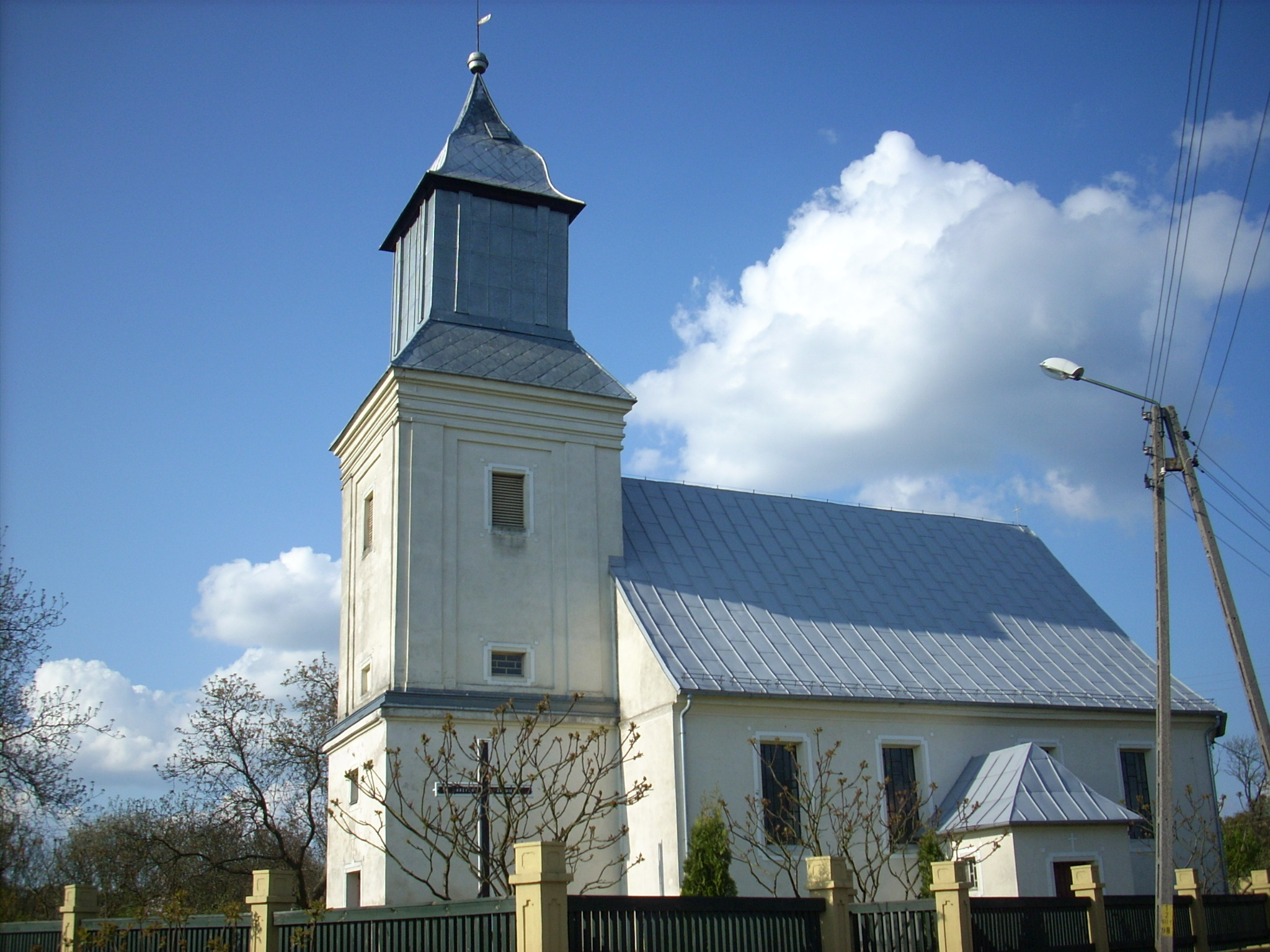 XVIII-wieczny p.w. Wniebowzięcia NMP w Mierzęcinie według stanu z 2008 roku